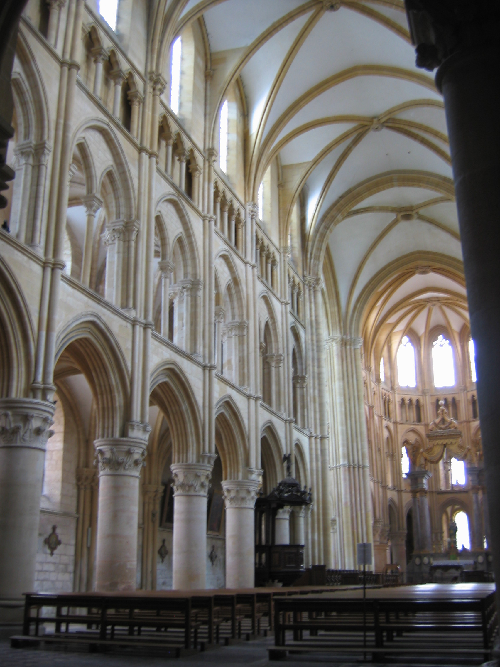 Nef Abbatiale Mouzon Ardennes France